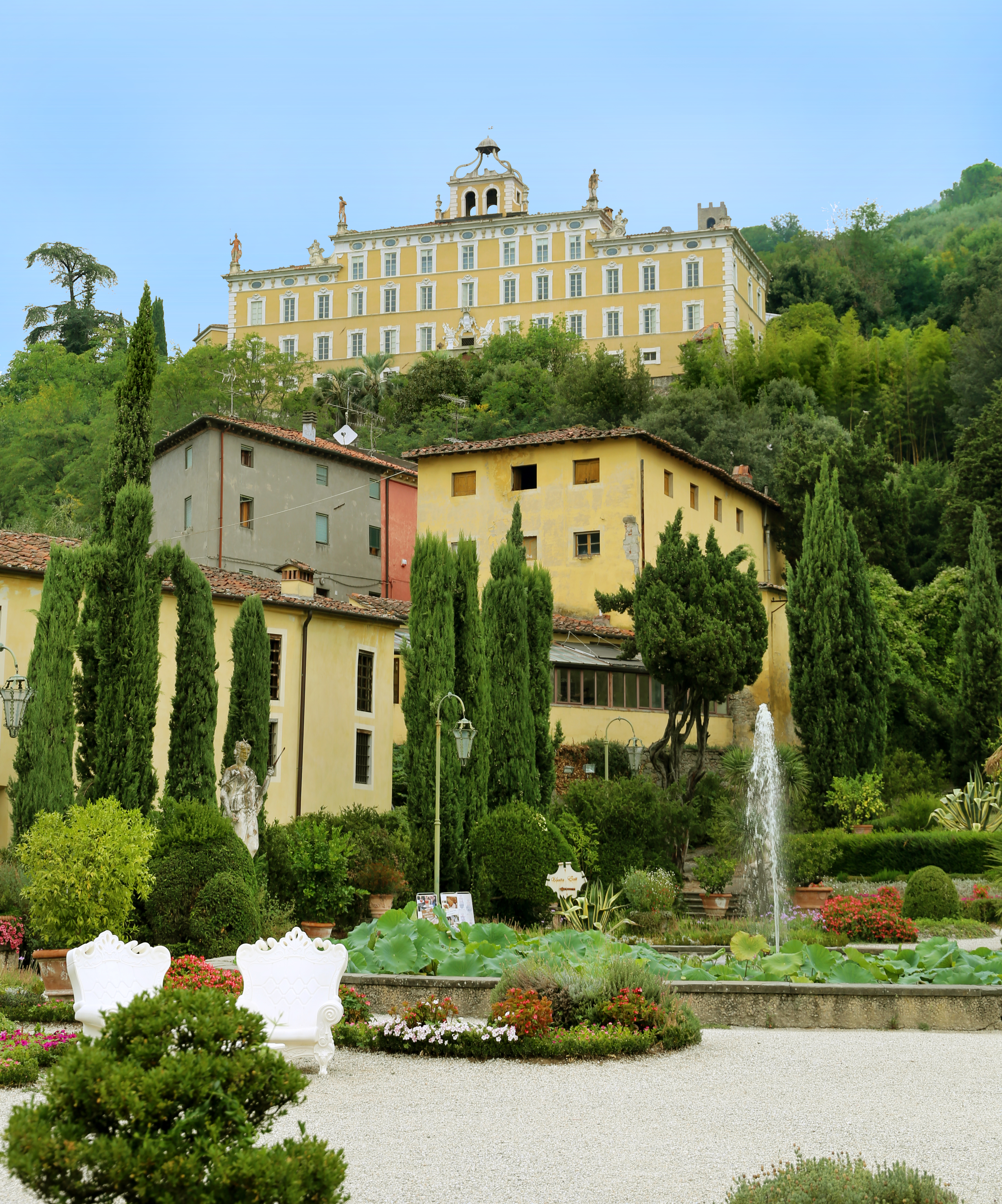 Giardino di Villa Garzoni This is a photo of a monument which is part of cultural heritage of Italy.